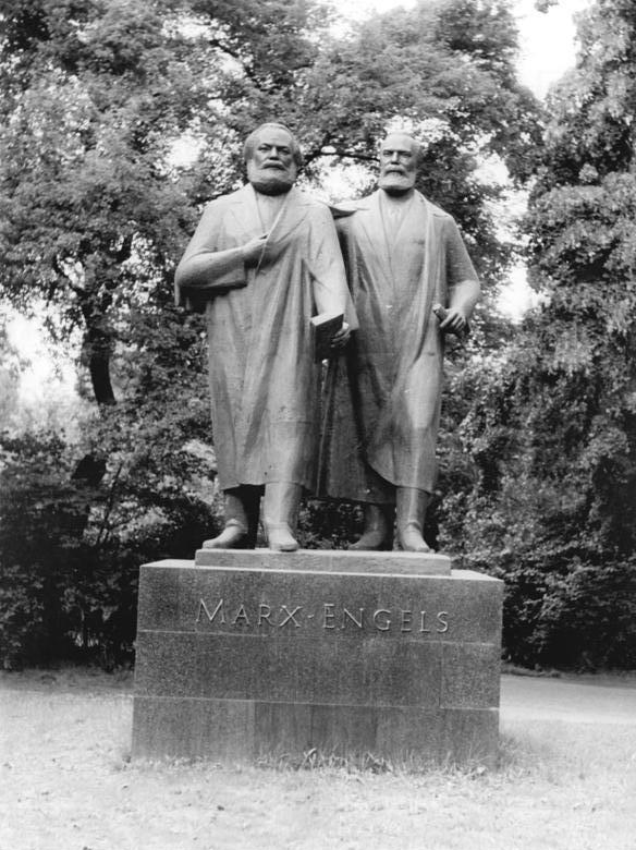 Chemnitz, Marx-Engels-Denkmal Zentralbild Schlegel Bö-Noa 17.7.1957 Marx-Engels-Denkmal in Karl-Marx-Stadt Ein Denkmal der Begründer des wissenschaftlichen Sozialismus Karl Marx und Friedrich Engels wurde am Vortage der Wahlen am 22. Juni 1957, vom 1. Sekretär des Zentralkomites der Sozialistischen Einheitspartei Deutschlands, Walter Ulbricht, in Karl-Marx-Stadt enthüllt. Das Monument ist ein Geschenk des ZK der SED und der Regierung der DDR an die Bevölkerung der sächsischen Arbeitermetropole, die seit 1955 in Würdigung ihrer revolutionären Traditionen und der großen Leistungen ihrer Einwohner beim Aufbau des Sozialismus den Namen "Karl Marx" trägt. Das Denkmal wurde von dem Bildhauer Walter Howart geschaffen und in der Berliner Kunstgießerei Seiler und Sieber in Bronze gegossen. Der Standort der überlebensgroßen Statuen, der ersten ihrer Art in der Welt, ist der Schillerplatz an der Straße der Nationen gegenüber der Hochschule für Maschinenbau. UBz: Das Marx-Engels-Denkmal.